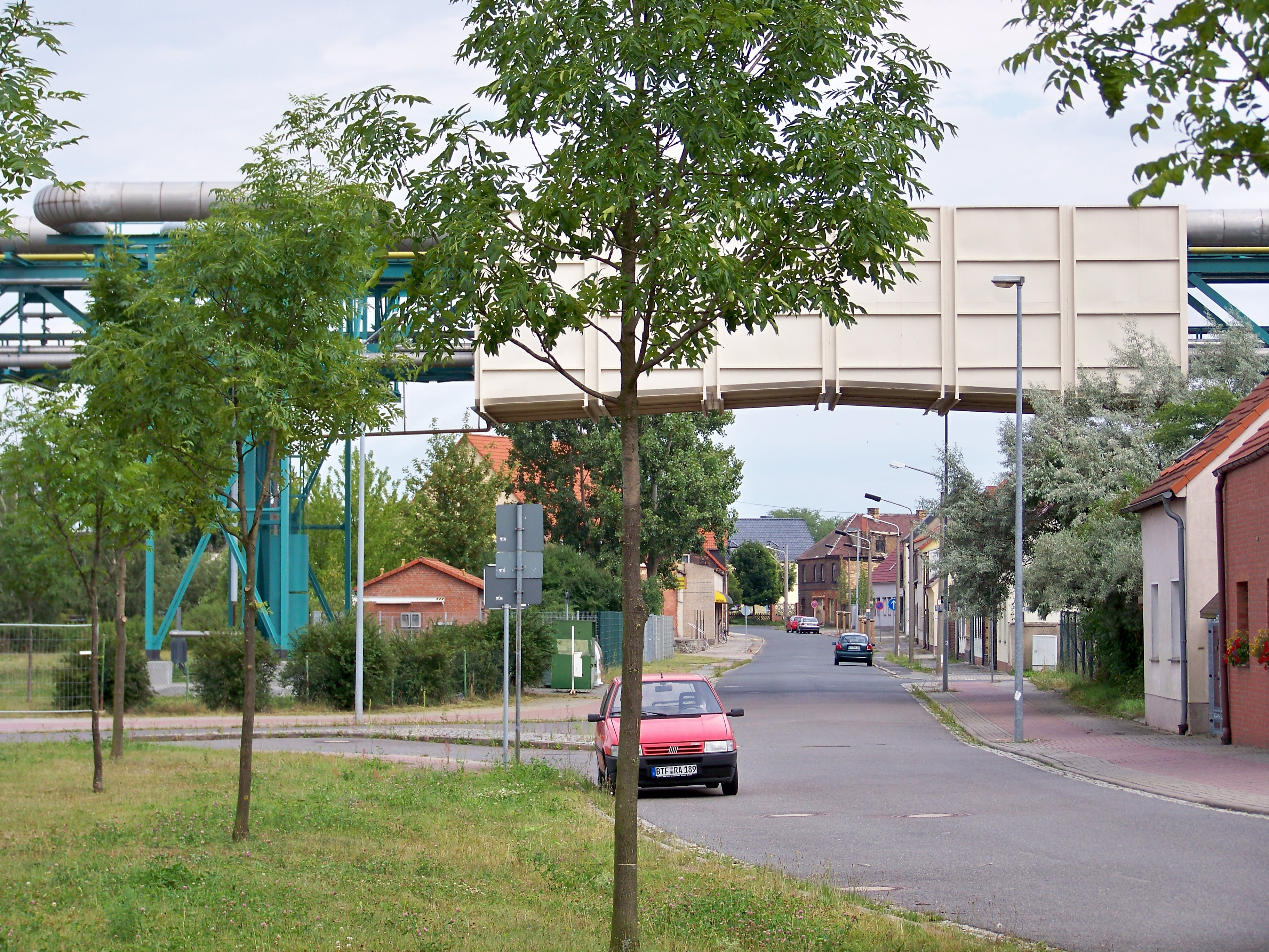 Der zur Stadt Bitterfeld-Wolfen gehörende Ort Greppin liegt mitten im Chemiepark Bitterfeld-Wolfen